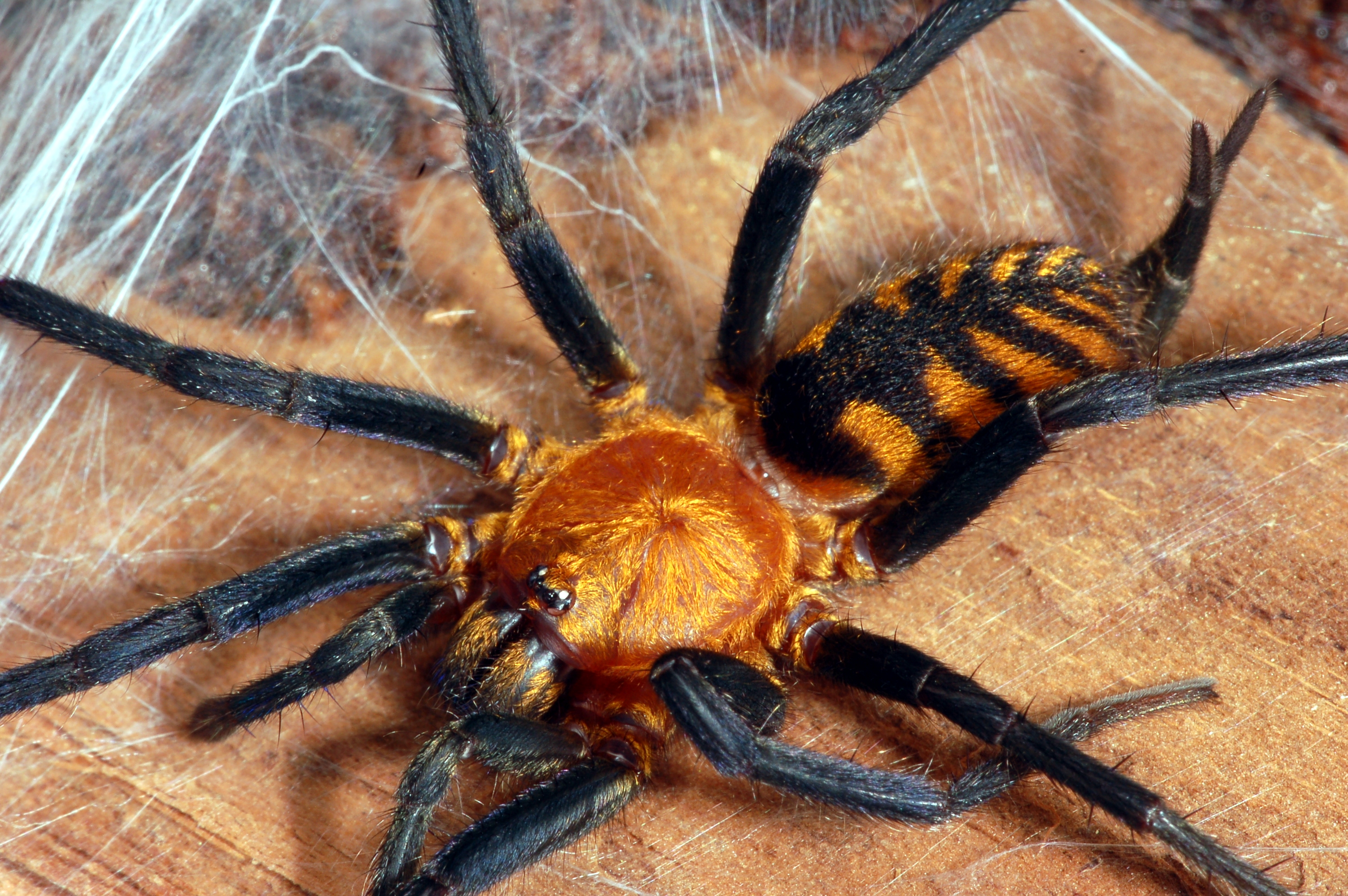 Doppelschwanzspinne Linothele fallax (Fam. Dipluridae) in Gefangenschaft, Museum Wiesbaden, Deutschland